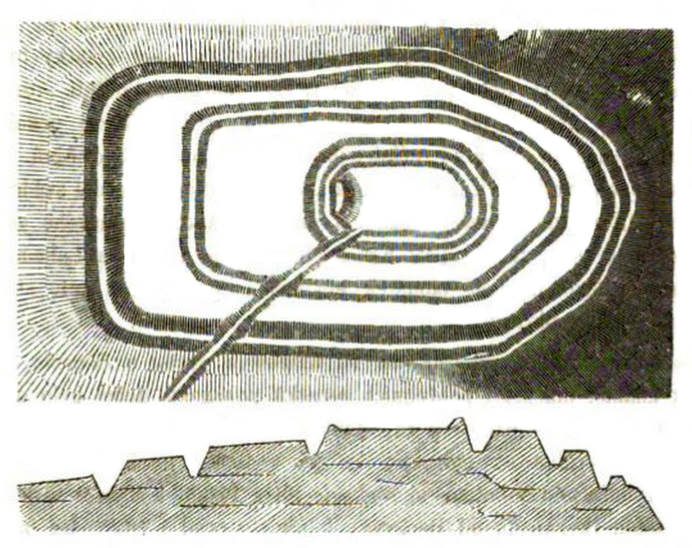 Půdorys hradu podle Jana Erazima Vocela publikovaný roku 1868